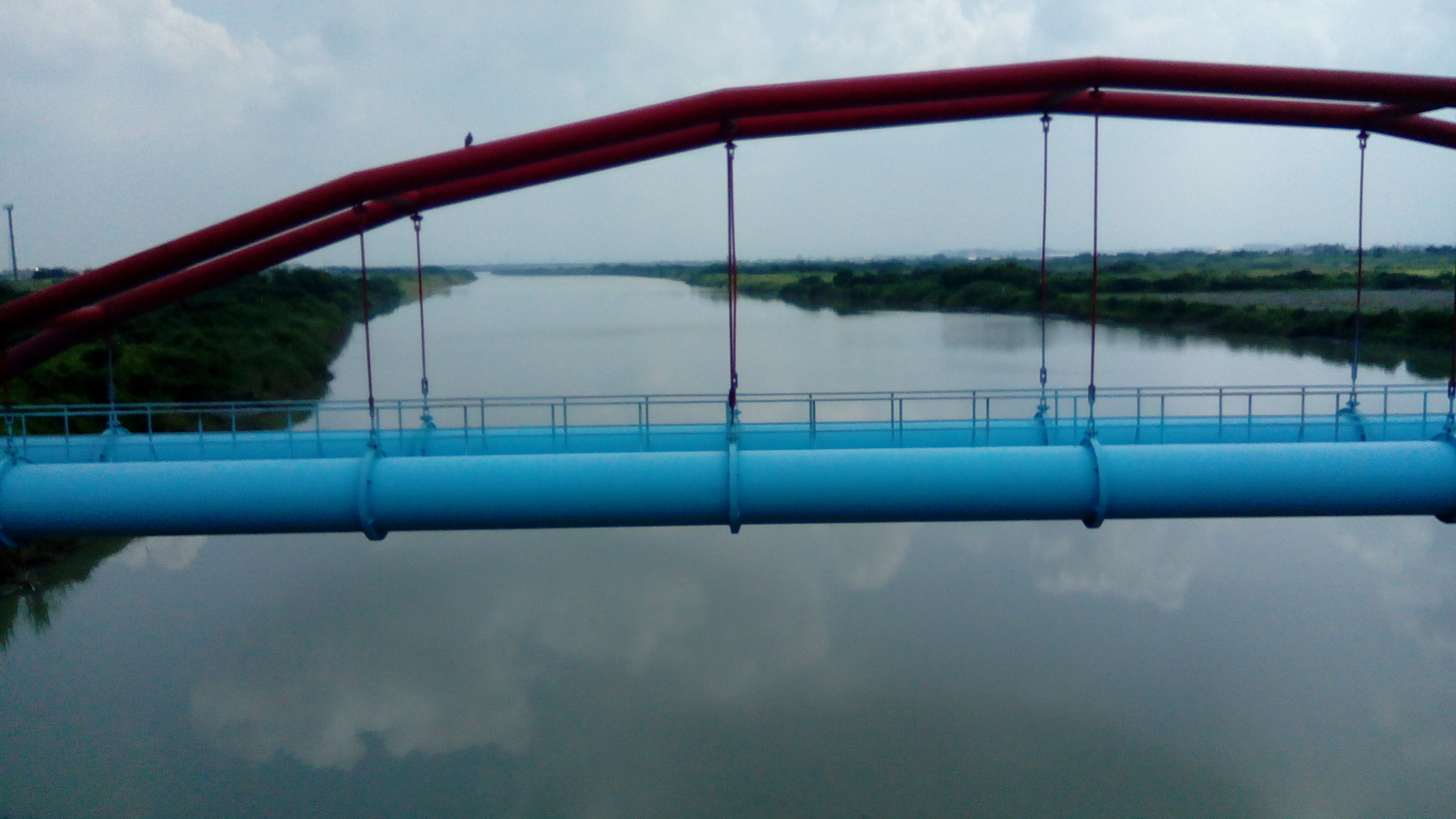 曾文溪